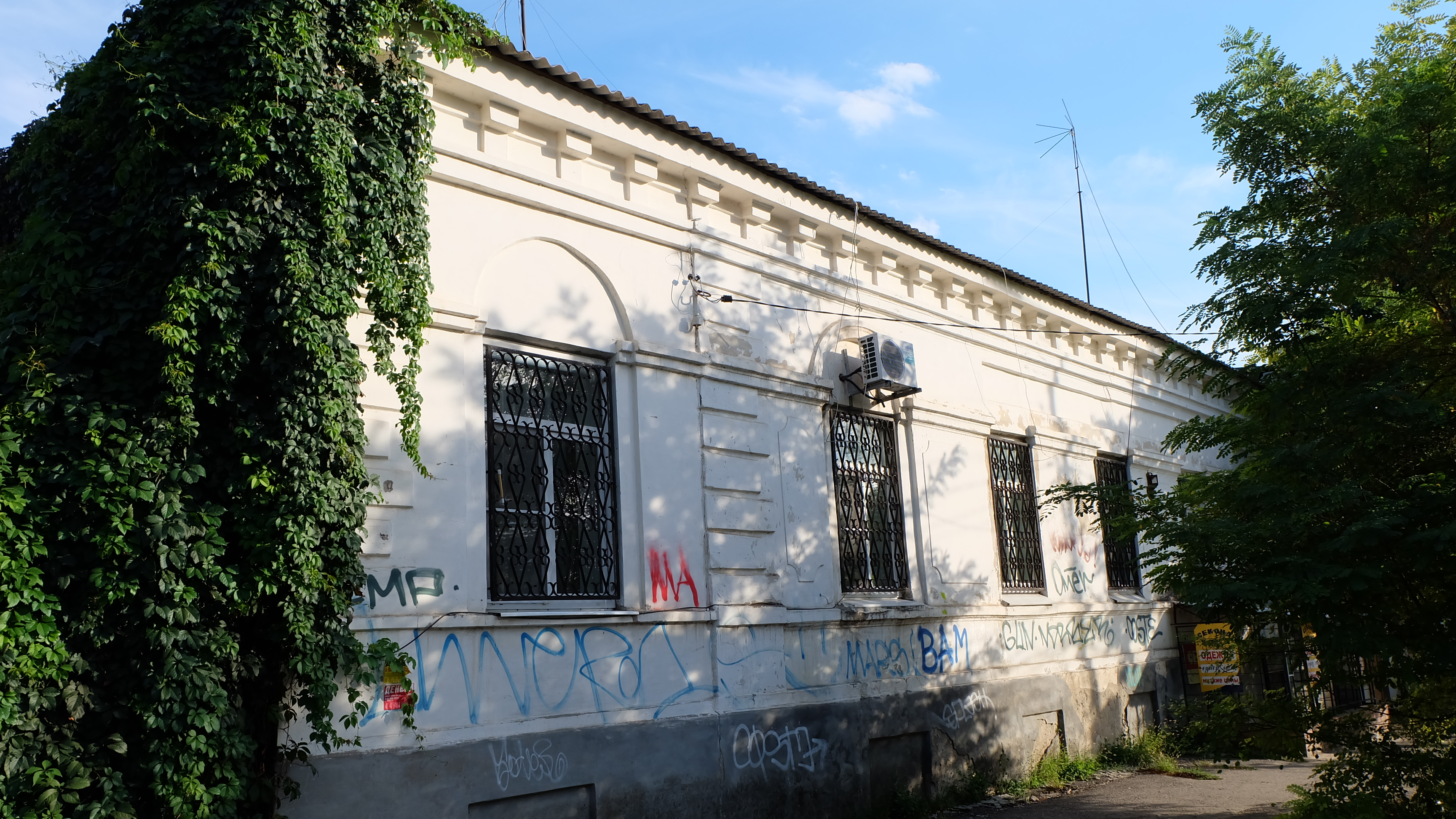 Жилой дом, комплекс застройки улицы: переулок Красный, 23, Таганрог, Ростовская область